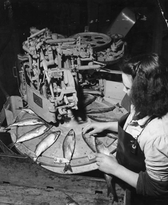 Lübeck, Fischverarbeitung 5.500 Heringsfilets pro Stunde ... liefert diese Spezialmaschine eines Lübecker Werkes, die mit ein paar Zusatzgeräten und einer Arbeitskraft die Fische köpft, ausweidet, entgrätet und wäscht. Sie wird - auch in das Ausland - nur vermietet, nicht verkauft. Nur nach England kommt echter Export in Frage an eine Firma, die ihrerseits die Maschinen vermietet. Über 200 Maschinen des Lübecker Werkes arbeiten in aller Welt und 50 Fischdampfer wurden damit ausgerüstet. 21-4-49 Illus-dpd 3131-49 Siehe auch Nordischer Maschinenbau Rud. Baader